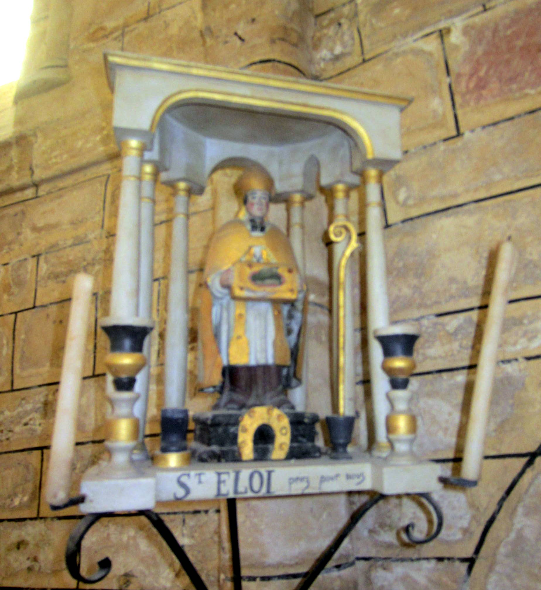 Statuette en tête des processions lors des fêtes du saint patron des agriculteurs et maréchaux-ferrants